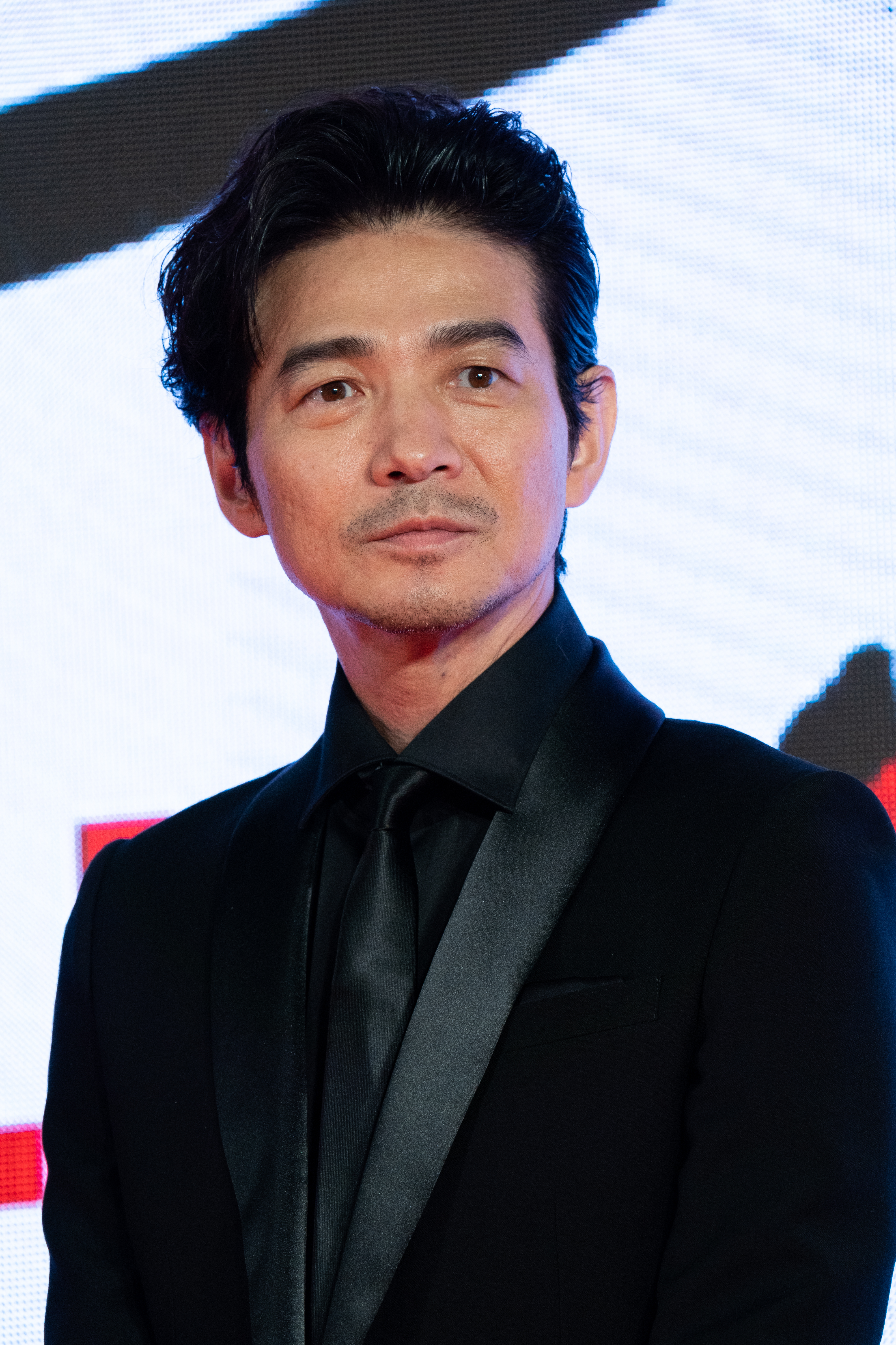 第32回 東京国際映画祭 オープニングセレモニー 吉岡秀隆 (男はつらいよ お帰り 寅さん)